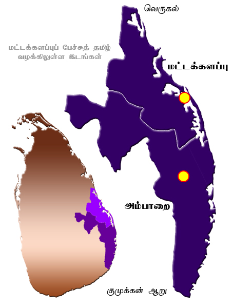 மட்டக்களப்புப் பேச்சுத் தமிழ் வழக்கத்திலுள்ள இடங்கள்